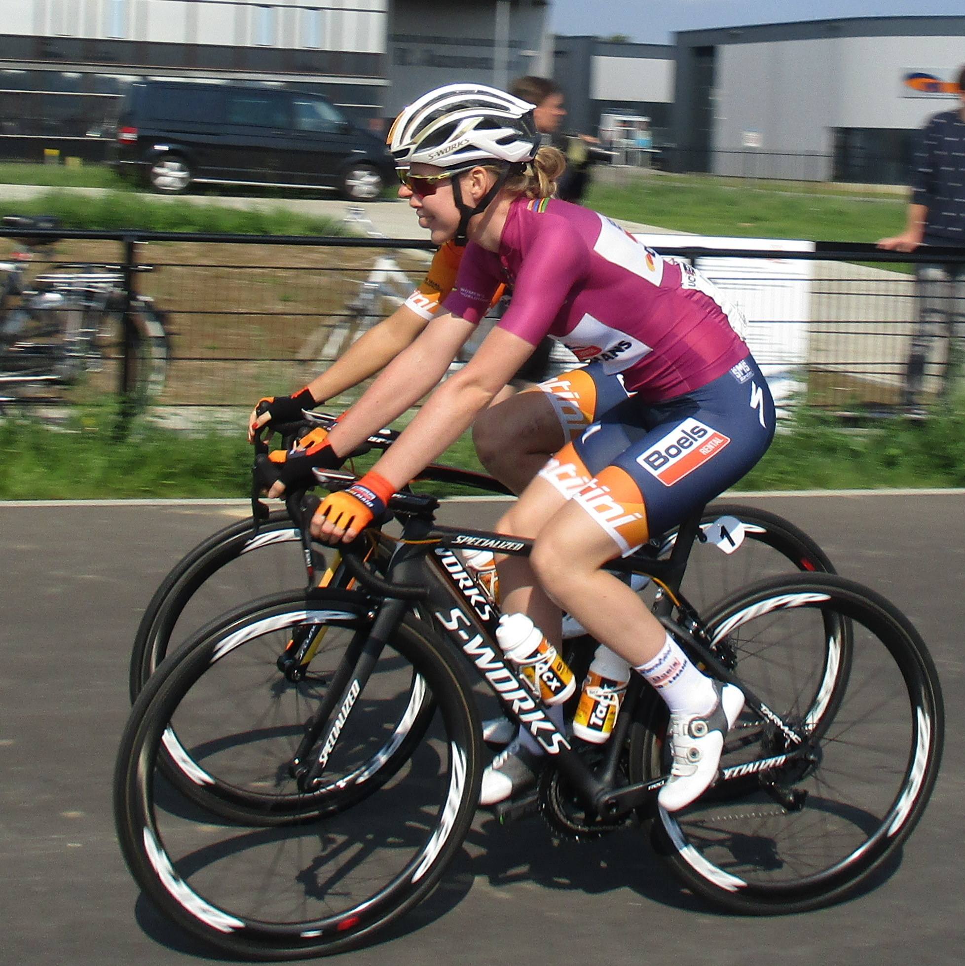 Start van de 6e etappe van de Boels Ladies Tour 2017 op het Tom Dumoulin Bike Park in Sittard-Geleen.